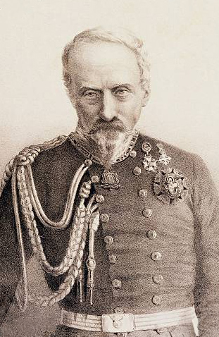 ritratto del generale Ettore Gerbaix de Sonnaz (1787-1867), comandante del 2° Corpo d'Armata dell'Esercito Sardo durante la 1ª Guerra d'Indipendenza e comandante la Divisione di Cavalleria durante la 2ª Guerra d'Indipendenza. Senatore del Regno e Ministro della Guerra. - litografia, ridotta, ritoccata